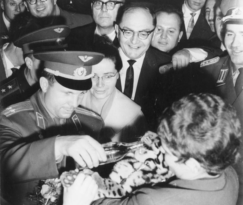 Zentralbild-Kohls 20.10.1963 Valentina Tereschkowa und Juri Gagarin besichtigen Berliner Tierpark. Die viel umjubelten sowjetischen Kosmonauten Valentina Tereschkowa und Juri Gagarin in Begleitung von Lotte Ulbricht besichtigten am Nachmittag des 20.10.1963 den Berliner Tierpark. Mit großem Interesse besichtigten die Gäste das erst vor wenigen Wochen der Öffentlichkeit übergebene Alfred-Brehm-Haus. UBz.: Juri Gagarin tauft ein kleines Tigerbaby. Dahinter Valentina Gagarina und Prof. Dr. Dathe.